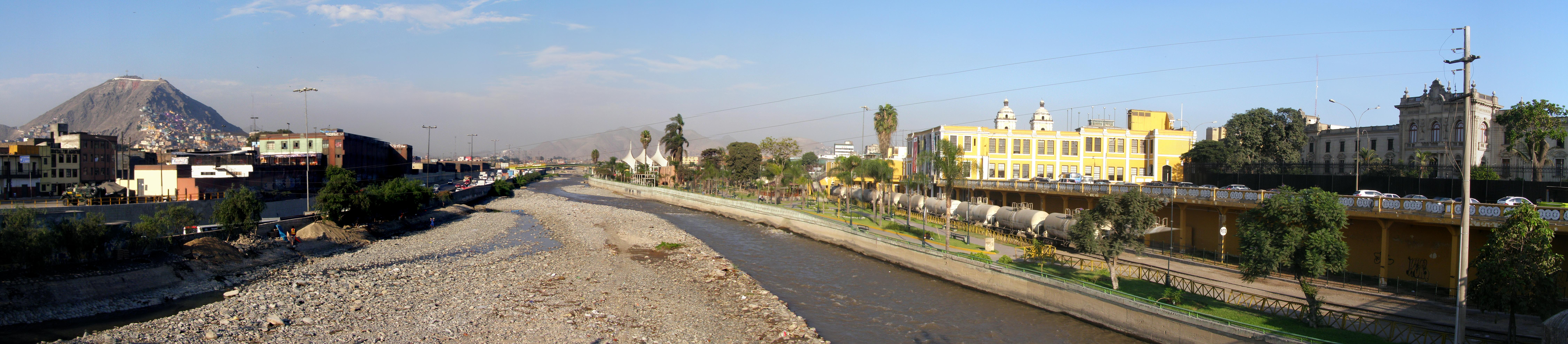 Panorama del distrito del Rímac en Perú